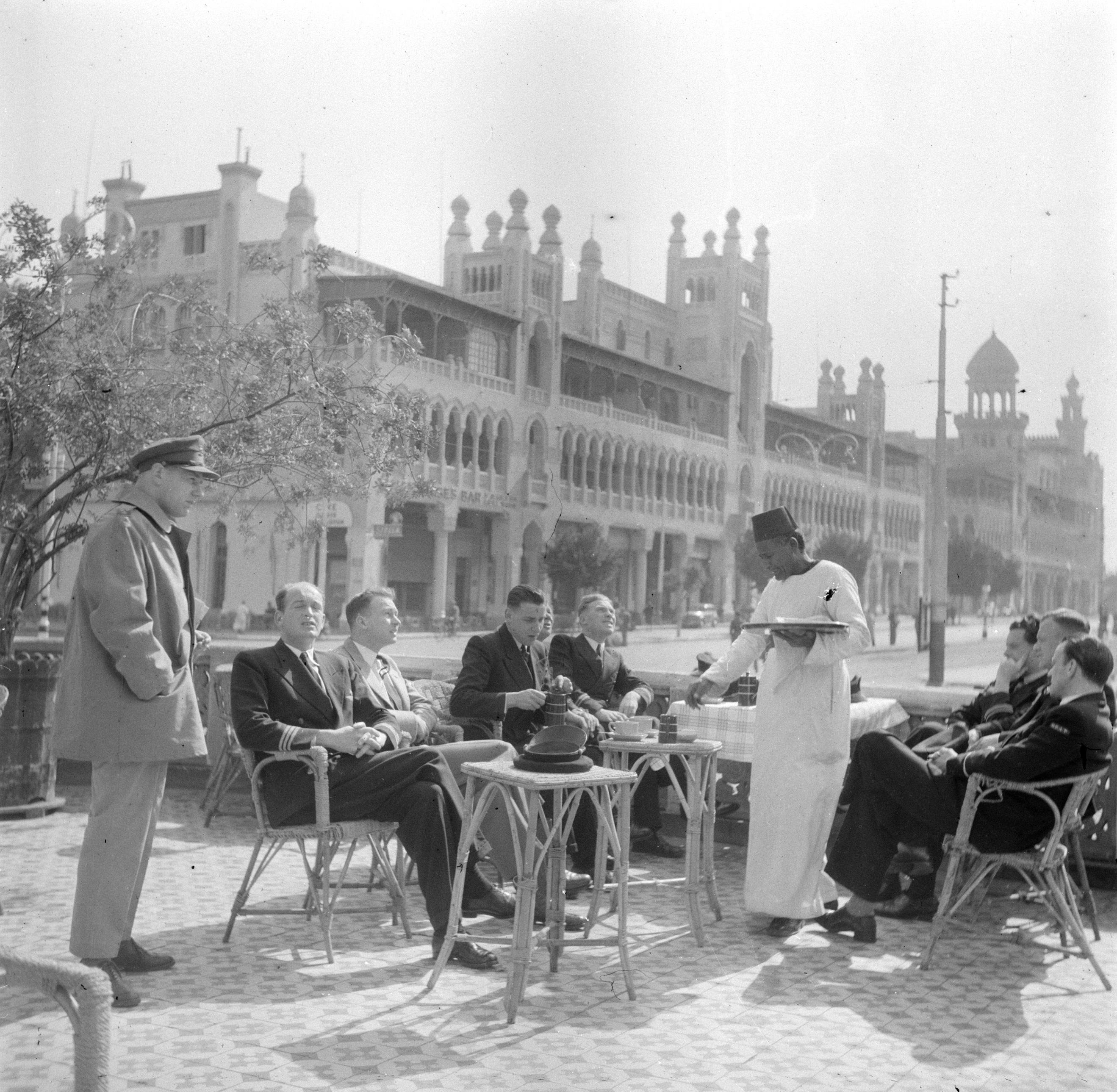 Collectie / Archief : Fotocollectie Van de Poll Reportage / Serie : Egypte Beschrijving : Cairo, Heliopolis. Terras aan de Ibrahim al-Lakanistreet met een groep mannen in luchtvaartuniform. Op de achtergrond een gebouw in oriëntaalse stijl met winkels en appartementen. Een ober in kaftan en met een fez bedient Annotatie : Heliopolis, ten oosten van Cairo, werd gebouw door de Belgische industrieel baron Edouard Empain tussen 1905 en 1910. De wijk telt vele paleizen, appartementencomplexen en hotels in een luxe orientaalse stijl Datum : ongedateerd Locatie : Cairo, Egypte, Heliopolis Trefwoorden : architectuur, cafés, eclecticisme, horeca, horecapersoneel, piloten, serviesgoed, stoelen, tafels, terrassen, torens, uniformen Fotograaf : Poll, Willem van de Auteursrechthebbende : Nationaal Archief Materiaalsoort : Negatief (6x6) Nummer archiefinventaris : bekijk toegang 2.24.14.02 Bestanddeelnummer : 254-5435